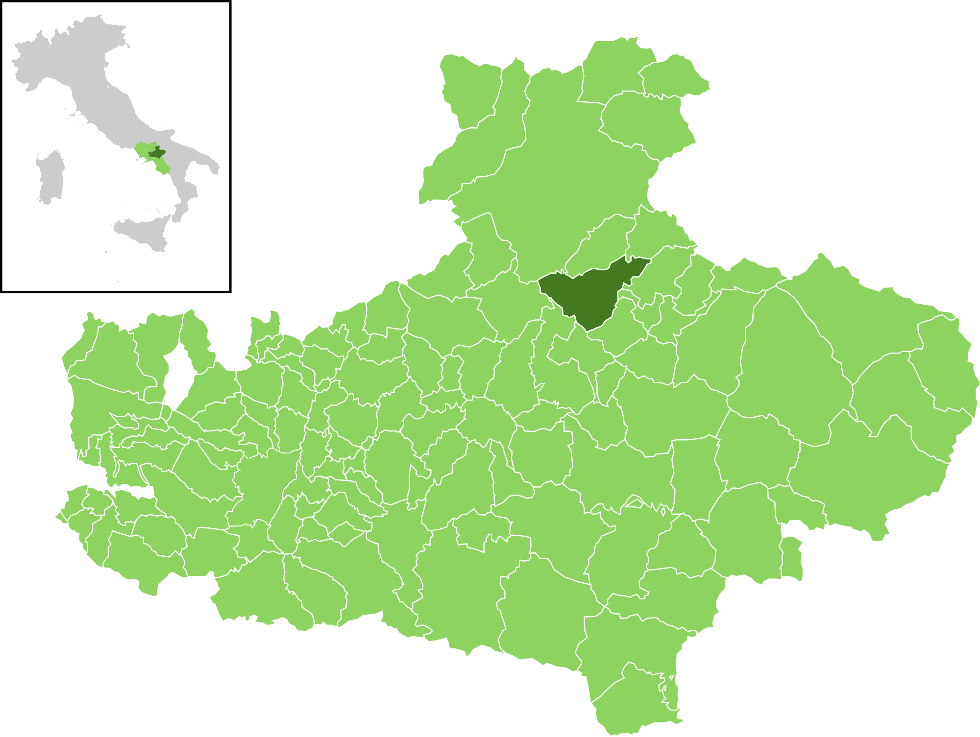 Il comune all'interno della provincia di Avellino